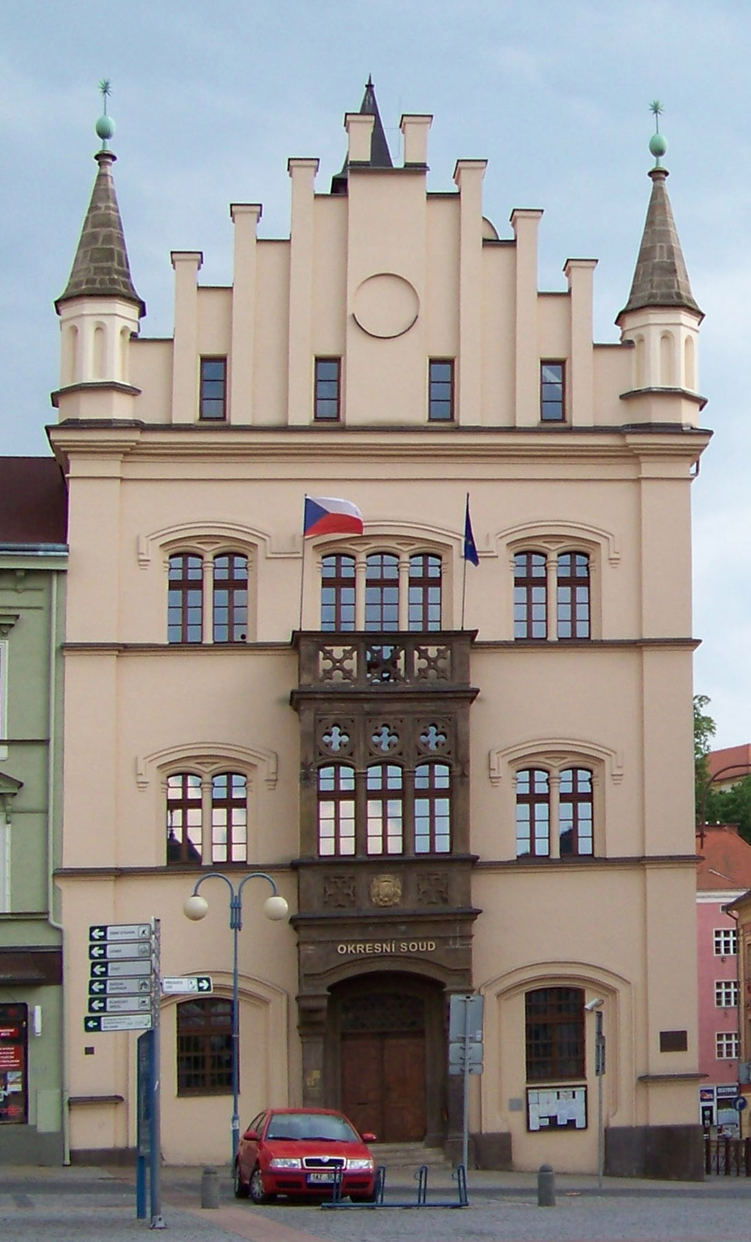 Budova Okresního soudu v Děčíně na náměstí